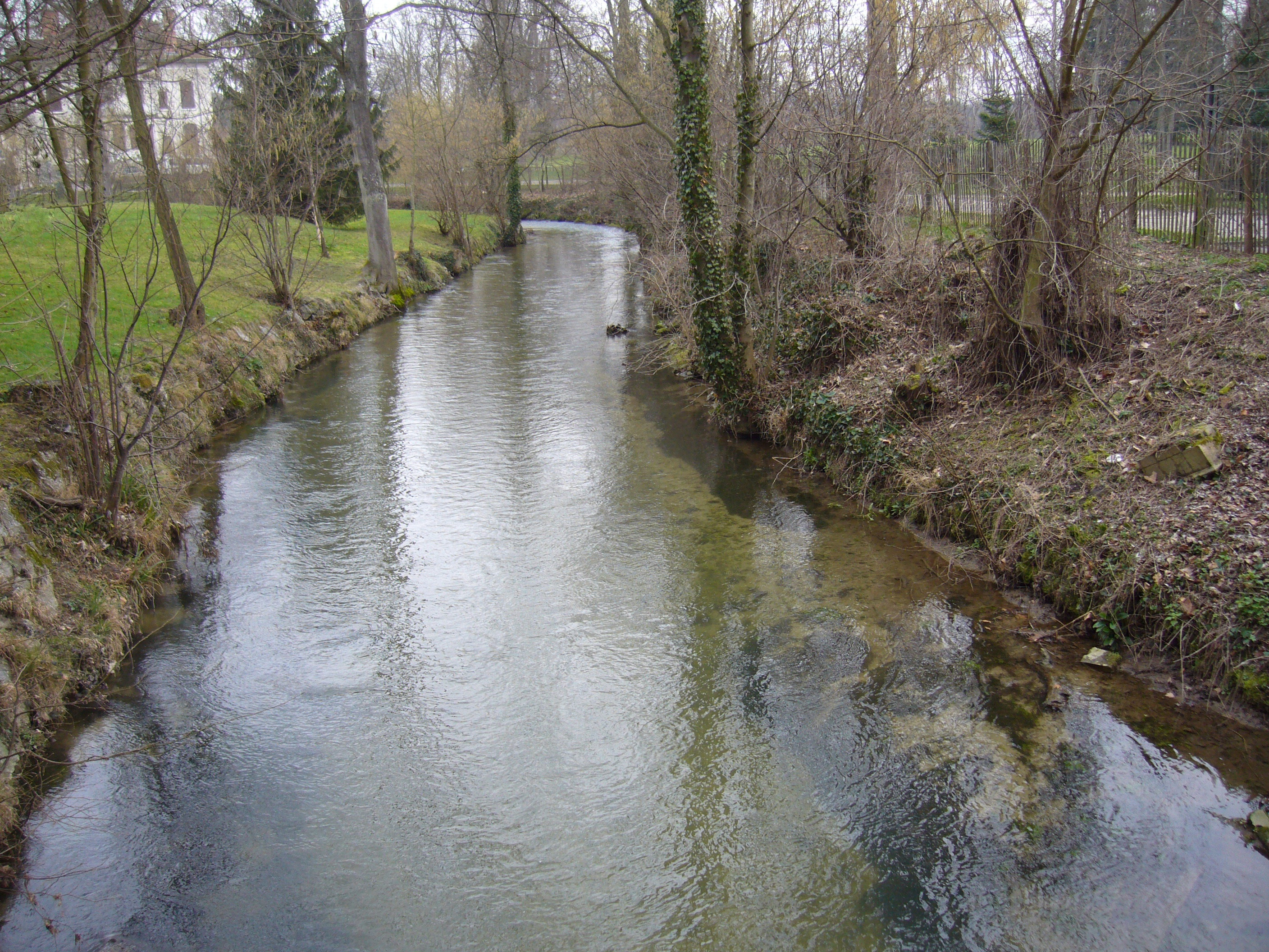 La rivière de la Gère à Estrablin, Isère, France. Photo D.Etienne (Février 2007)